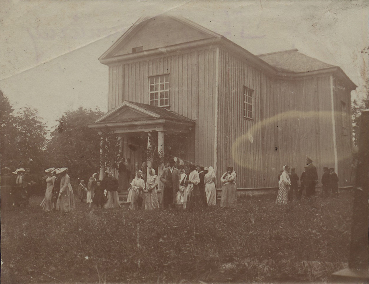 Беларуская (тарашкевіца): Абольцы (Abolcy). Касьцёл Унебаўзяцьця Найсьвяцейшай Панны Марыі